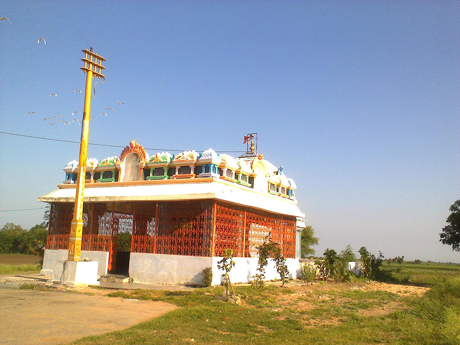 శ్రీఆంజనేయస్వామి దేవాలయం, బూడ్దిపాడు